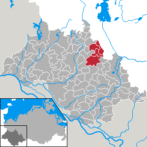 Former Amt Rastow in Mecklenburg-Vorpommern - district Ludwigslust